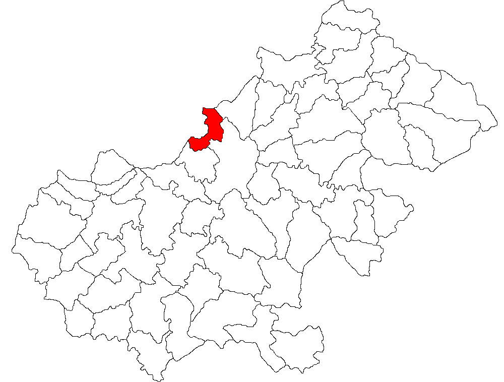 Categorie:Hărţi ale judeţului Satu Mare